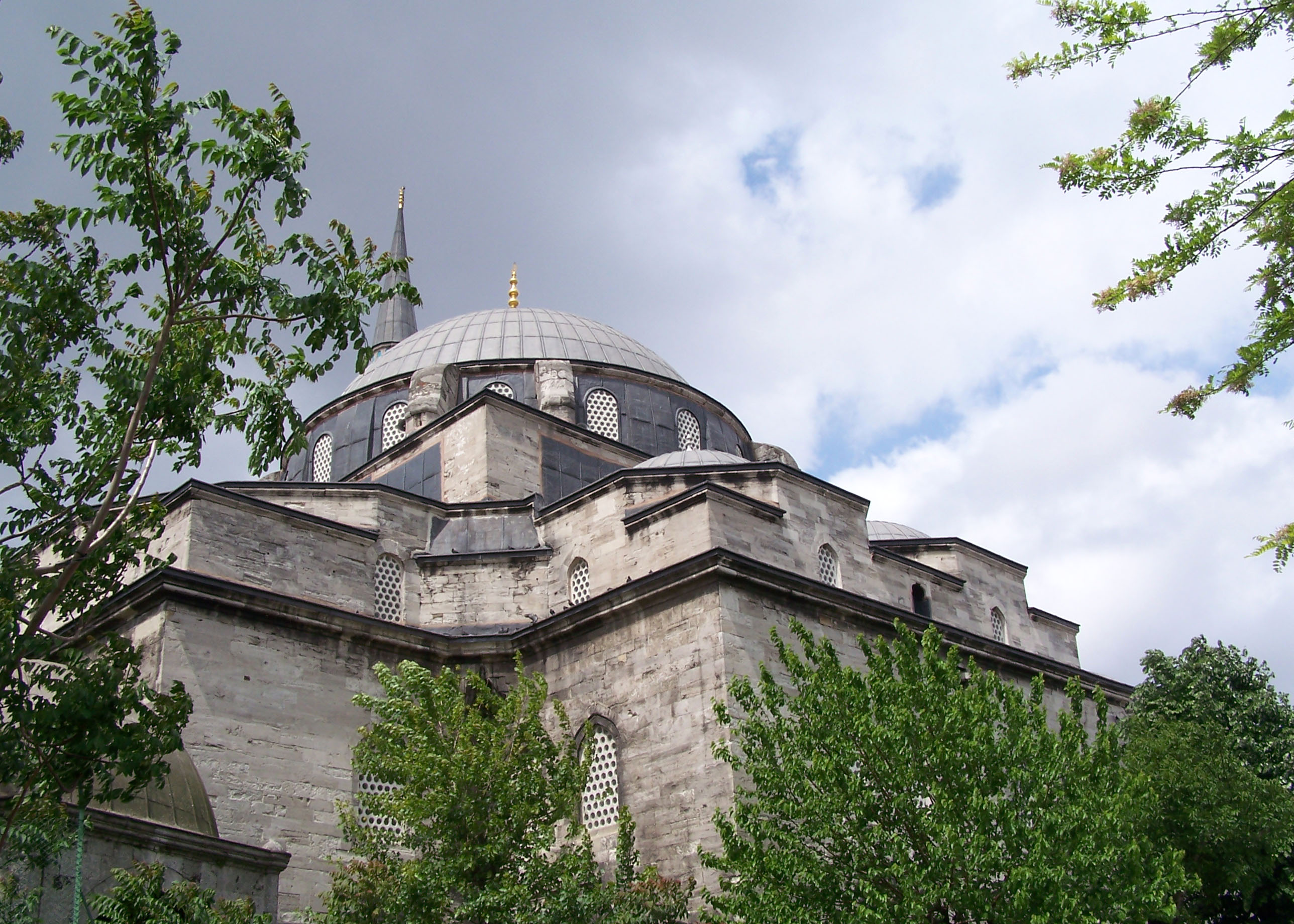 Gazi Atik Ali Paşa Camii in Çemberlitaş, Fatih